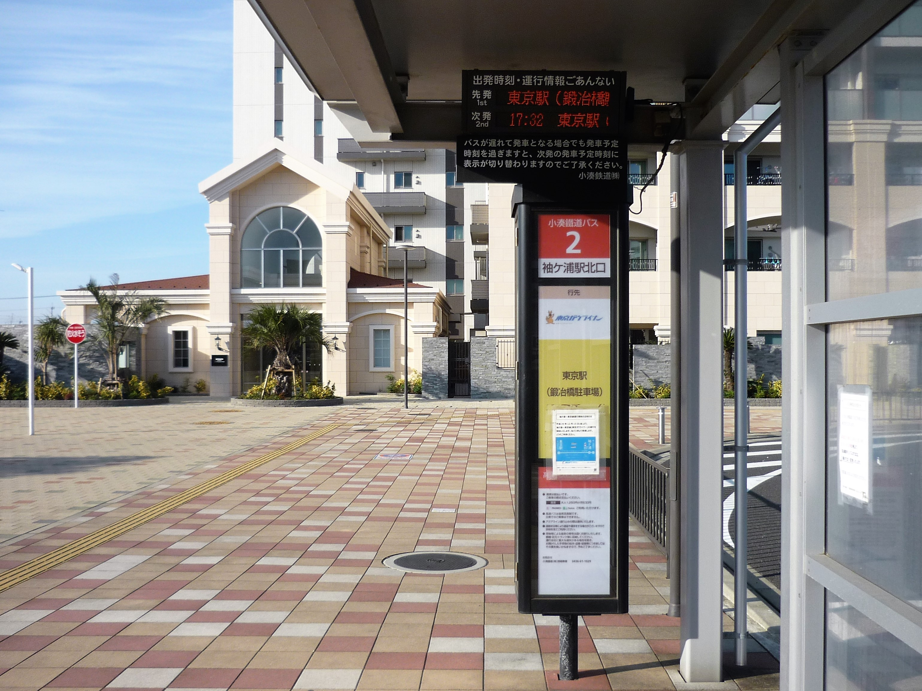 袖ケ浦駅北口2番バス乗り場 Panasonic Lumix DMC-FS3